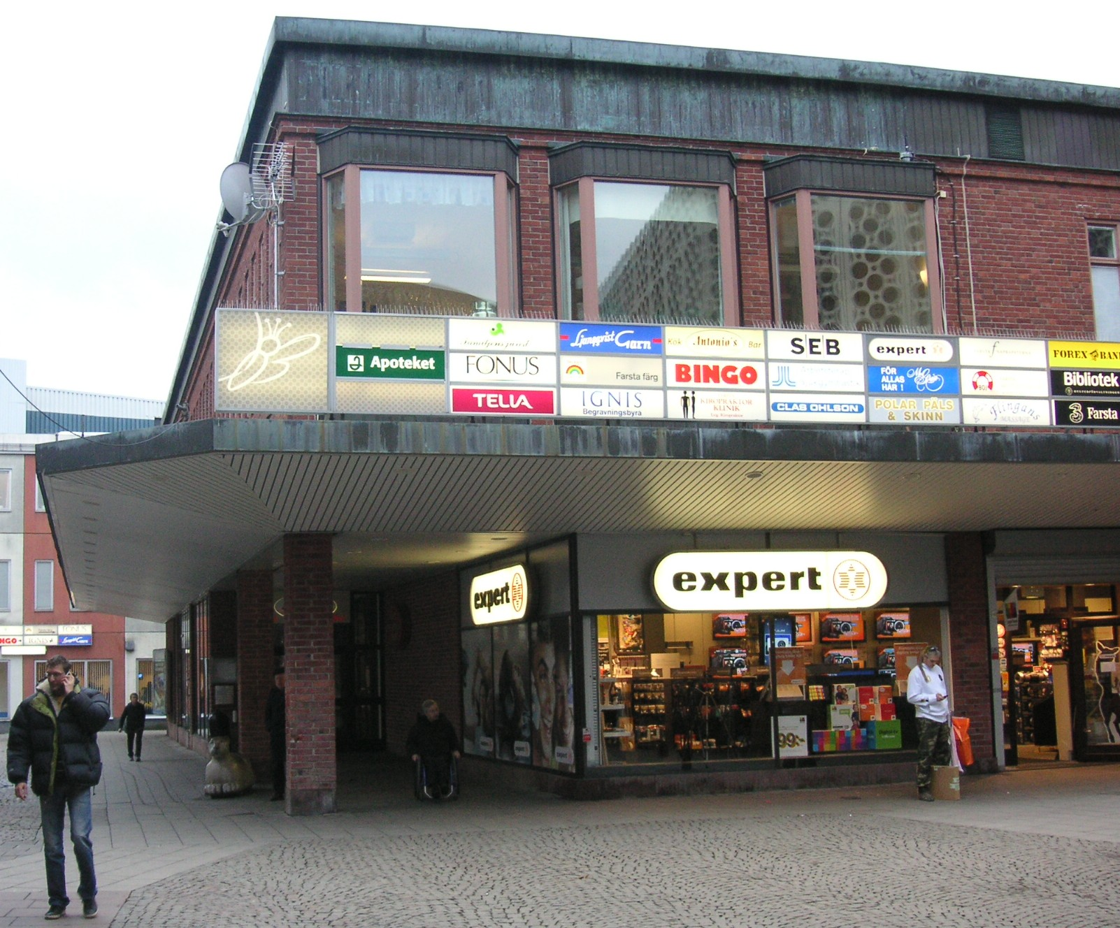 Före detta biografen "Fanfarens" entré i Farsta Centrum